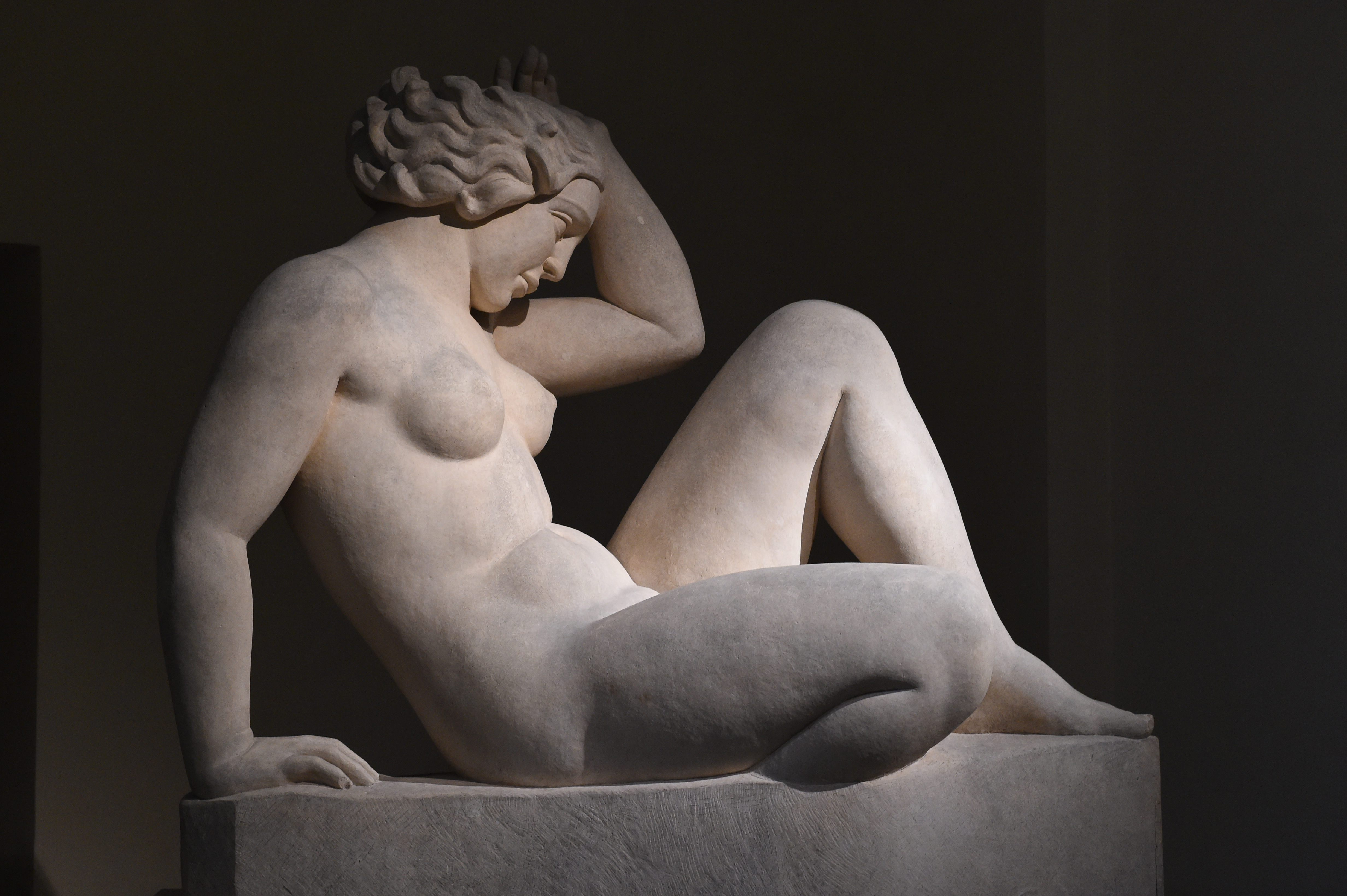 Sculpture en pierre, 1937. Dépôt du musée d'Orsay en 1982. Inv 1982-14. Sculpture restaurée grâce à la participation du Groupe Lafarge sur l'initiative de Mécènentreprise